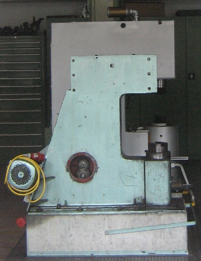 Zwei Lufthämmer in der HTL Bregenz